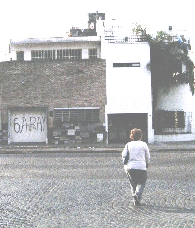 Imagen de la casa donde transcurrió gran parte de la producción artística de Julio Vanzo. Calle Cochabamba 2012, Rosario. Owner: Luis A. Blotta.